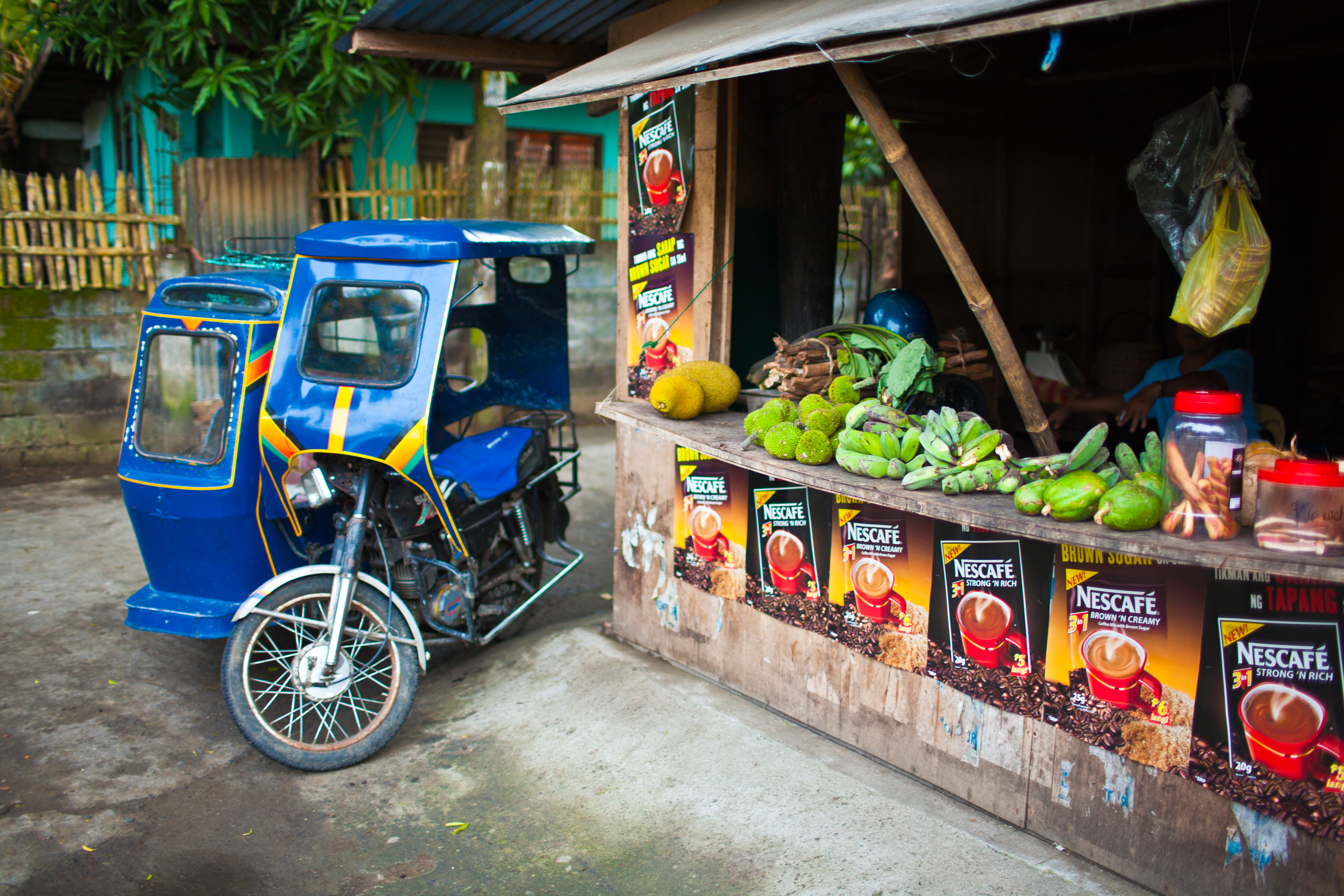 Donsol, Sorsogon, Philippines